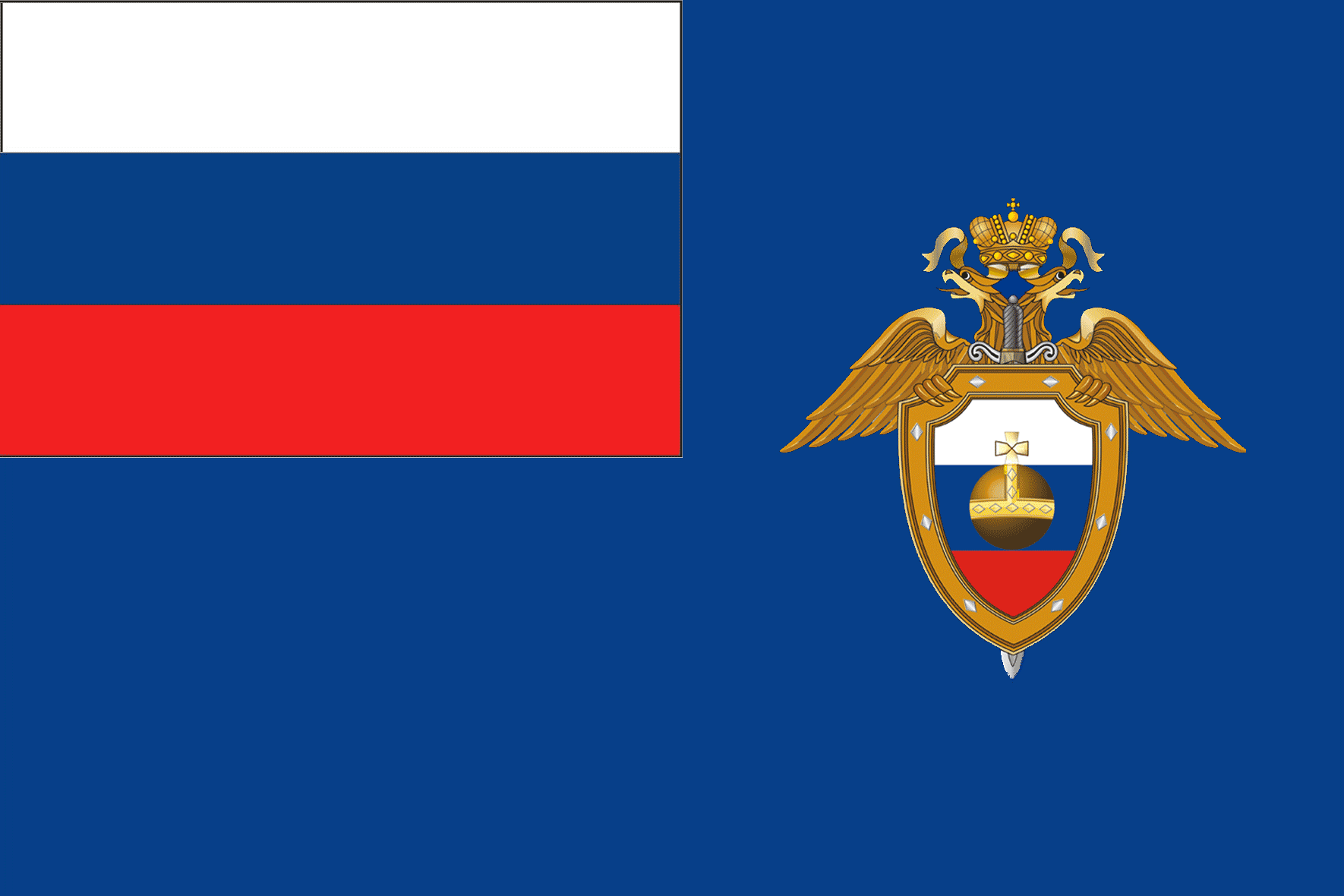 Флаг Главного управления специальных программ Президента (ГУСП), Российской Федерации